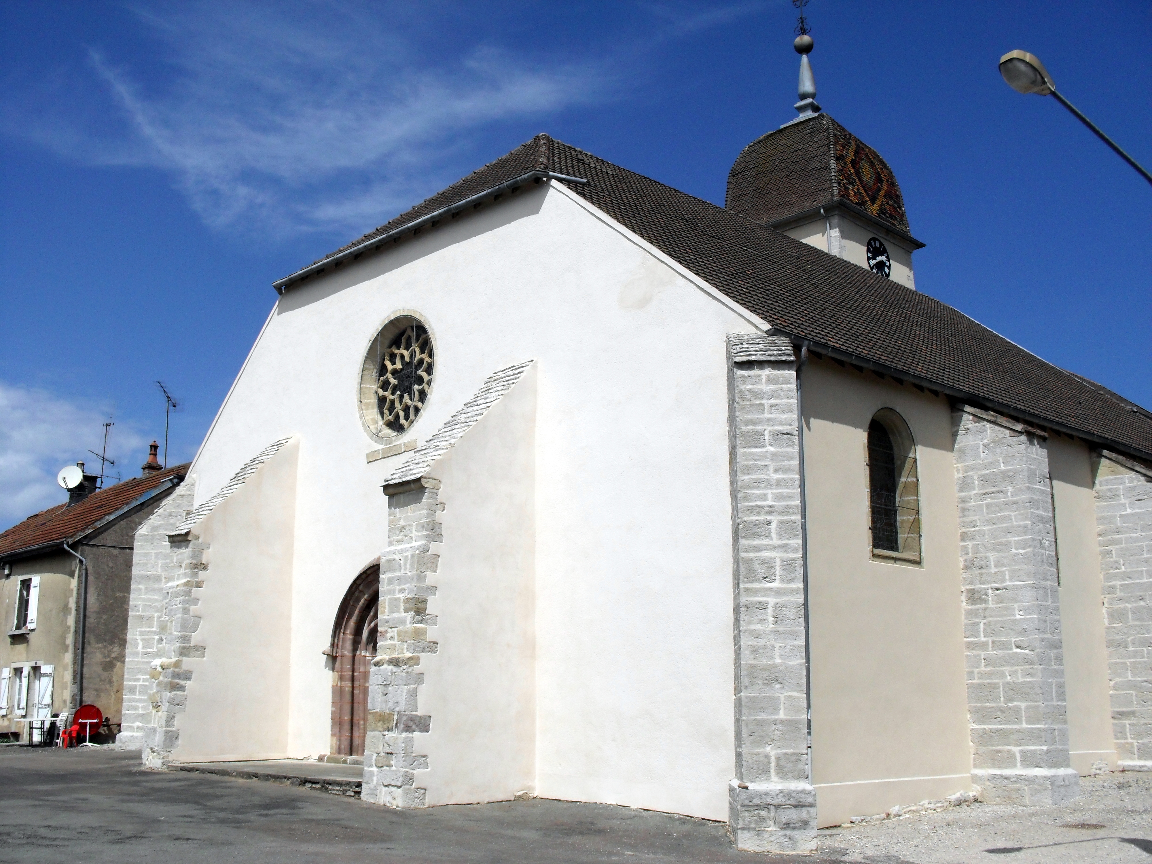 ancienne collégiale du chapitre de Calmoutier, avec son clocher comtois